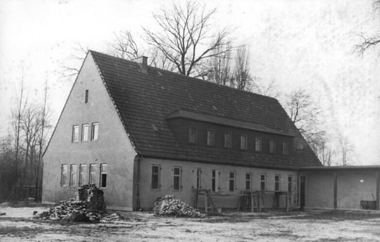 Berlin-Teptow, Insel der Jugend, Jugendwohnheim Zentralbild Quaschinsky 11.12.1950 Abtei- Insel wird Jugendinsel Die in der Spree gelegende Abtei-Insel in Berlin-Teptow wird zu einer Jugendinsel ausgebaut. Während ein Jugendklubheim bereits fertiggestellt ist, soll ein Wohnheim noch bis Ene 1950 schlüsselfertig werden. Weiter ist im Fünfjahrplan der Bau weiterer Klub- nd Wohnheime, eines Lerlingsheimes und eines Bootshauses geplant. UBz: Das Jugendwohnheim, das jetzt ausgebaut wird.